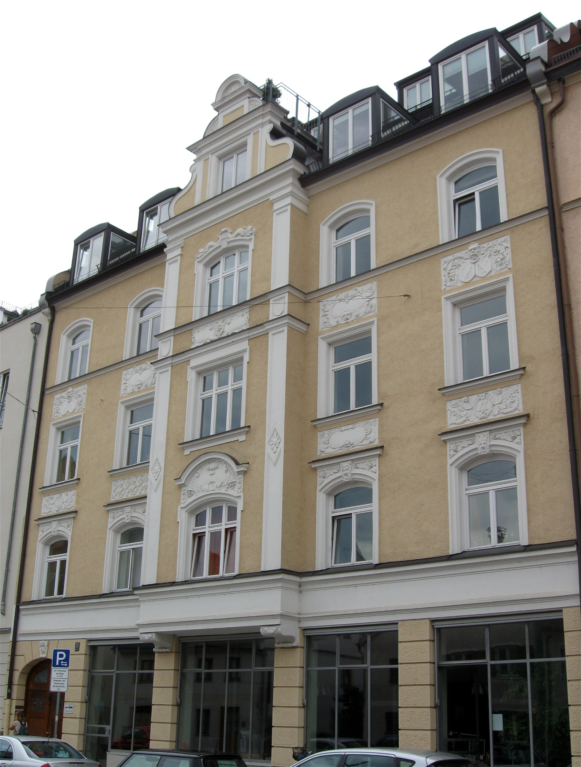 Kirchenstraße 21; Mietshaus, deutsche Renaissance, mit Erker und reichem Stuckdekor, 1898 von Ludwig Grothe; Gruppe mit Nr. 23 und 25.